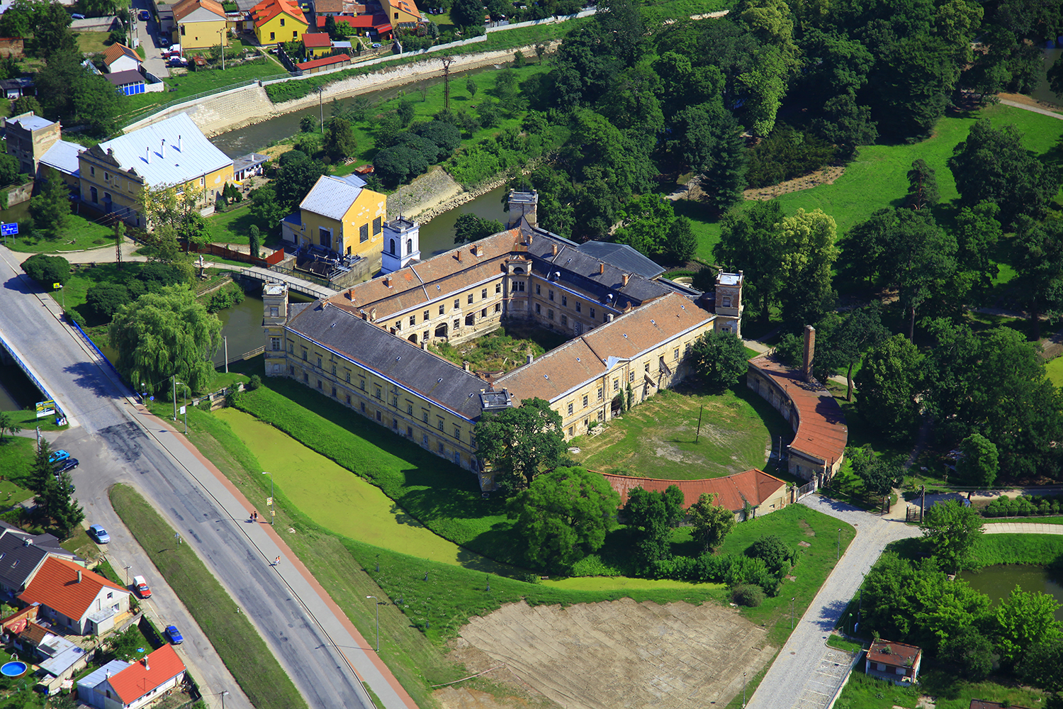 Letecký snímek